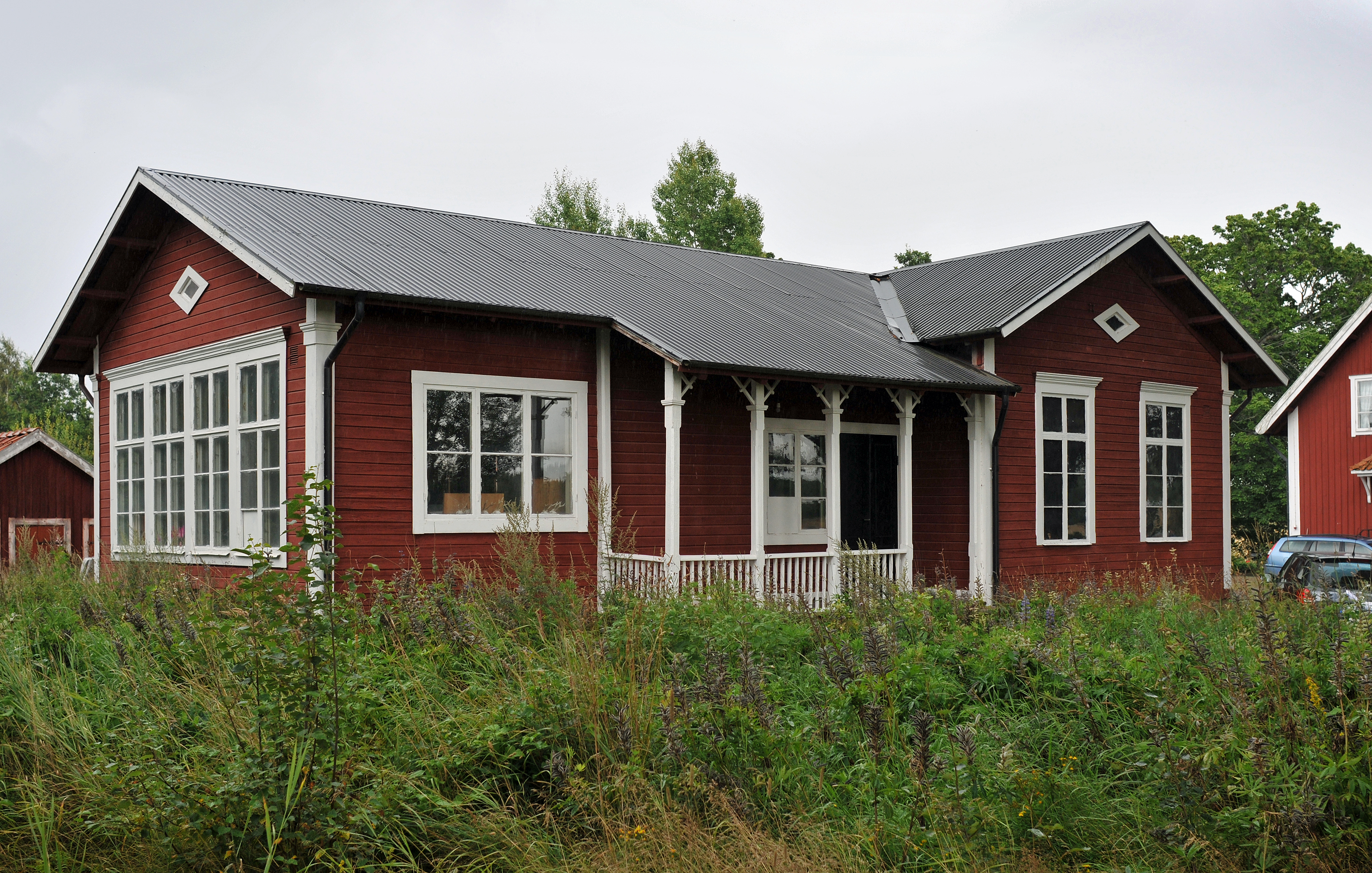 Fjällskärs skola i Stigtomta socken, Nyköpings kommun. Skolan byggdes 1880.